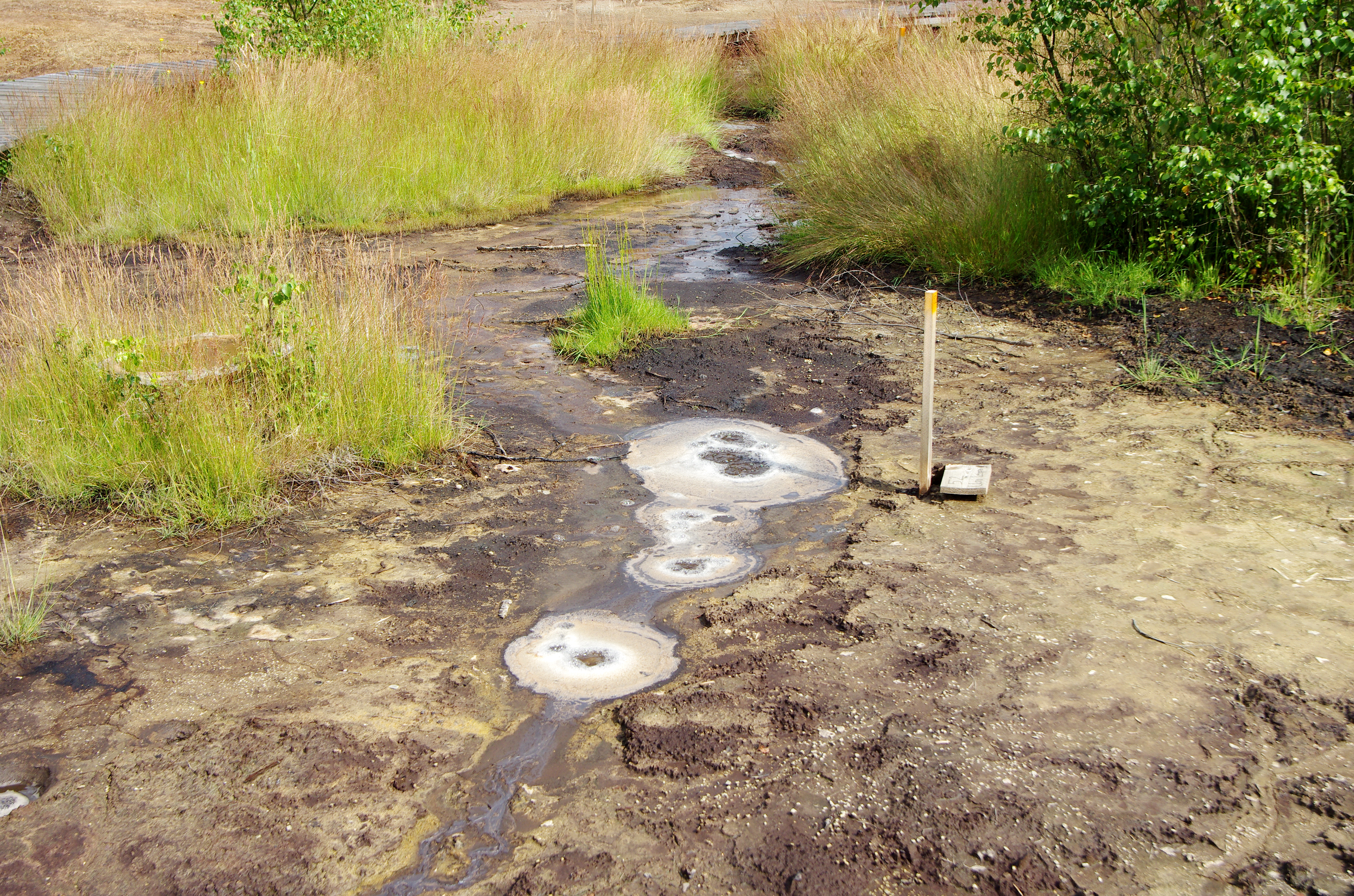 Národní přírodní rezervace Soos, mofety, okres Cheb